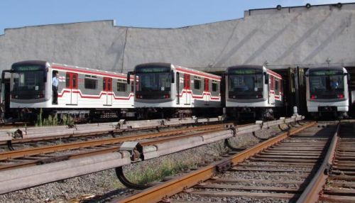 Tbilisi Metro Line - 2 VAGZAL LINE NEW TRAINS from 2006